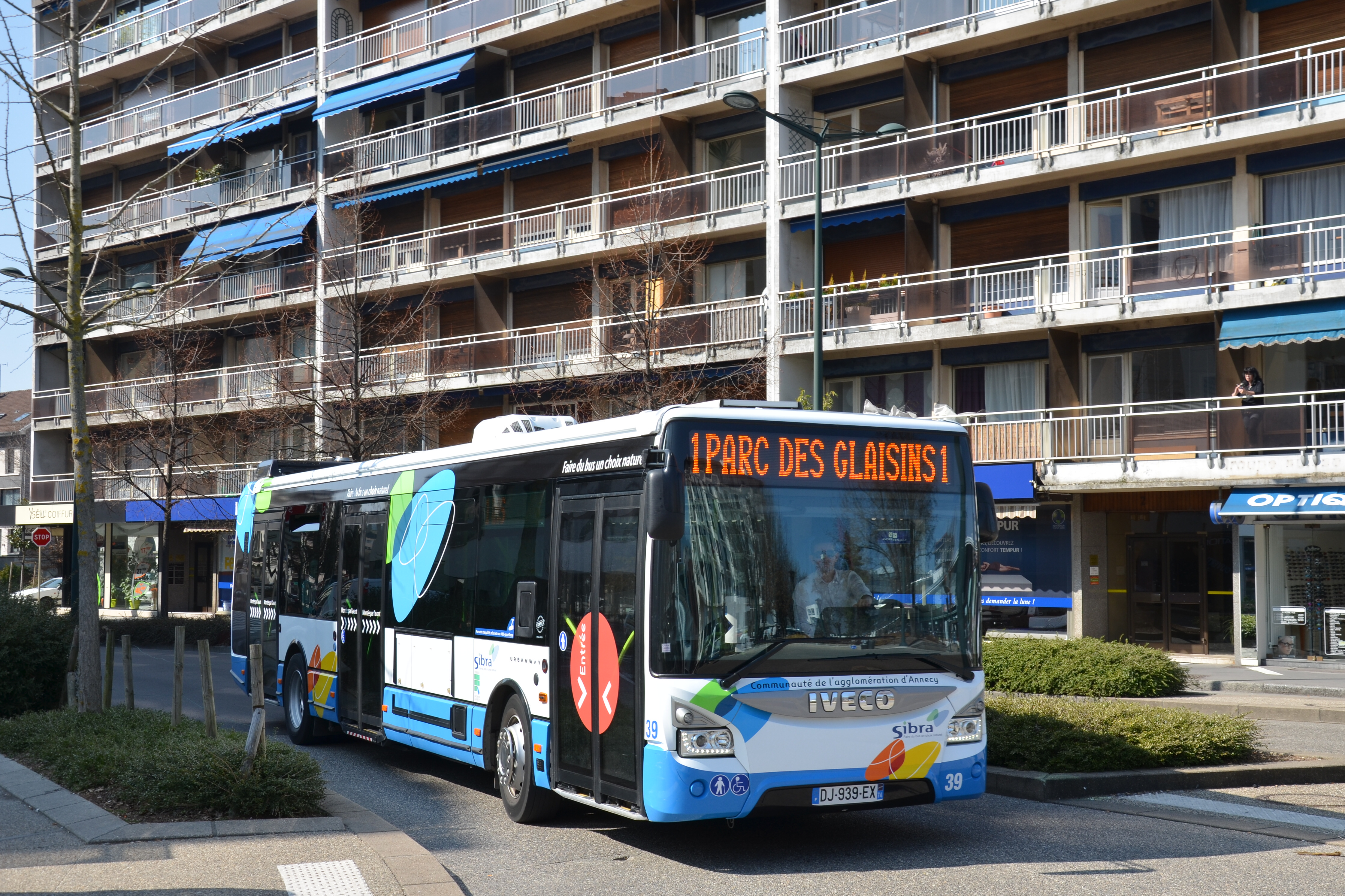 Iveco Bus UrbanWay 12 n°39 sur la ligne 1 du réseau SIBRA d'Annecy, au pôle d'échanges de la gare.